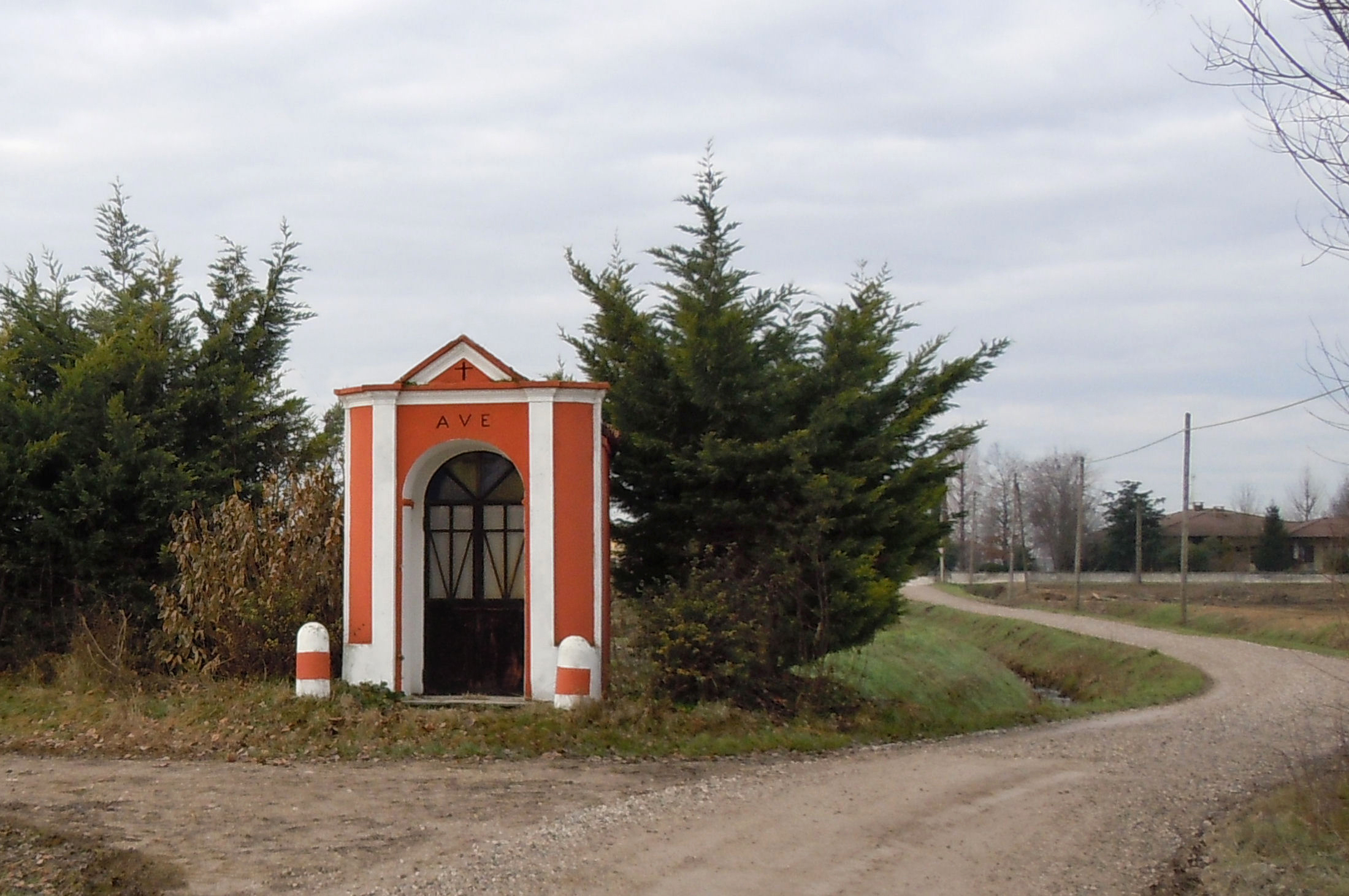 Castel Goffredo, edicola sacra in frazione Gambina.